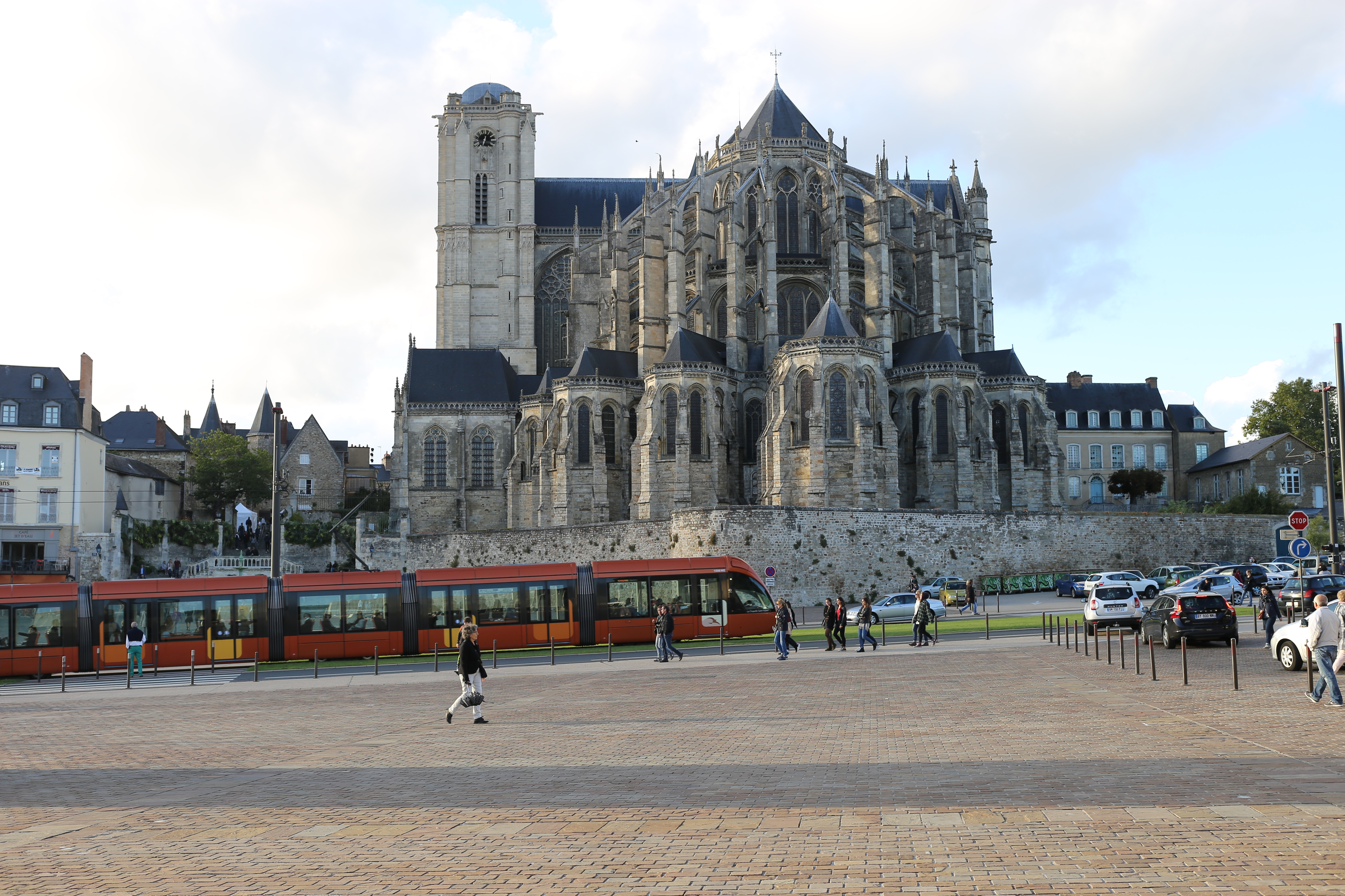 Place des Jacobins